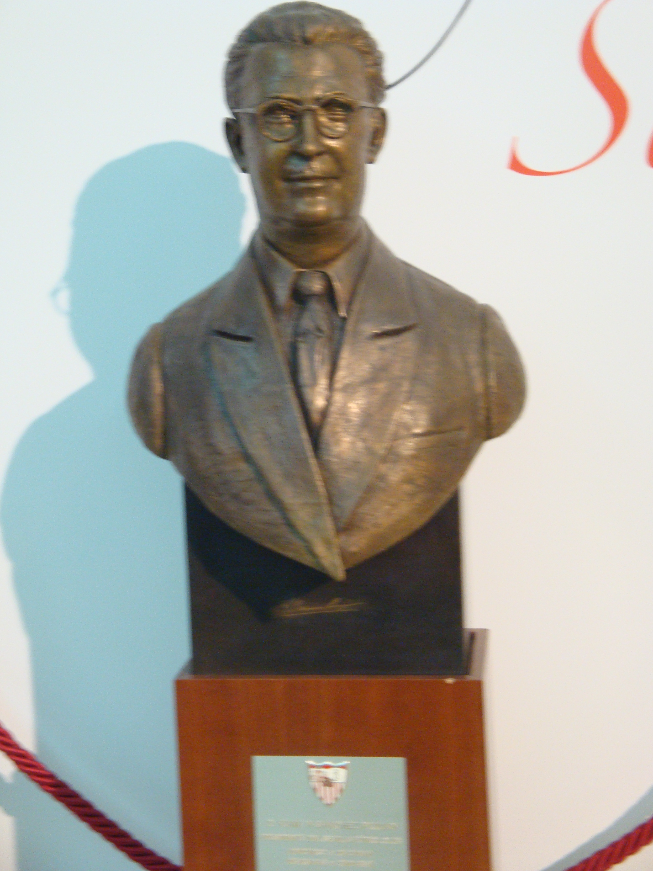 Busto del presidente Ramón Sánchez Pizjuan ubicado en el Estadio del Sevilla